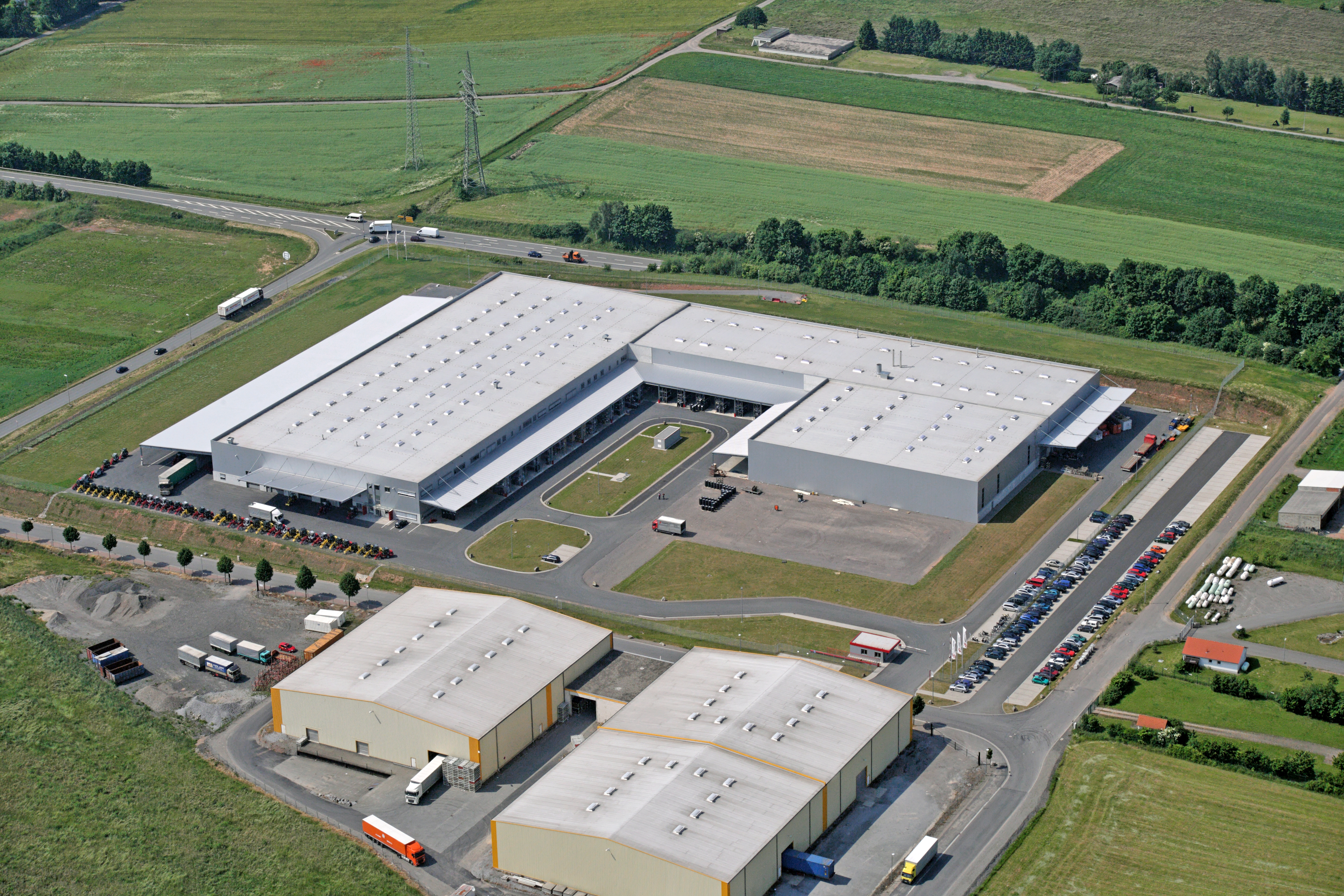 Weidemann Produktionswerk Korbach Luftaufnahme